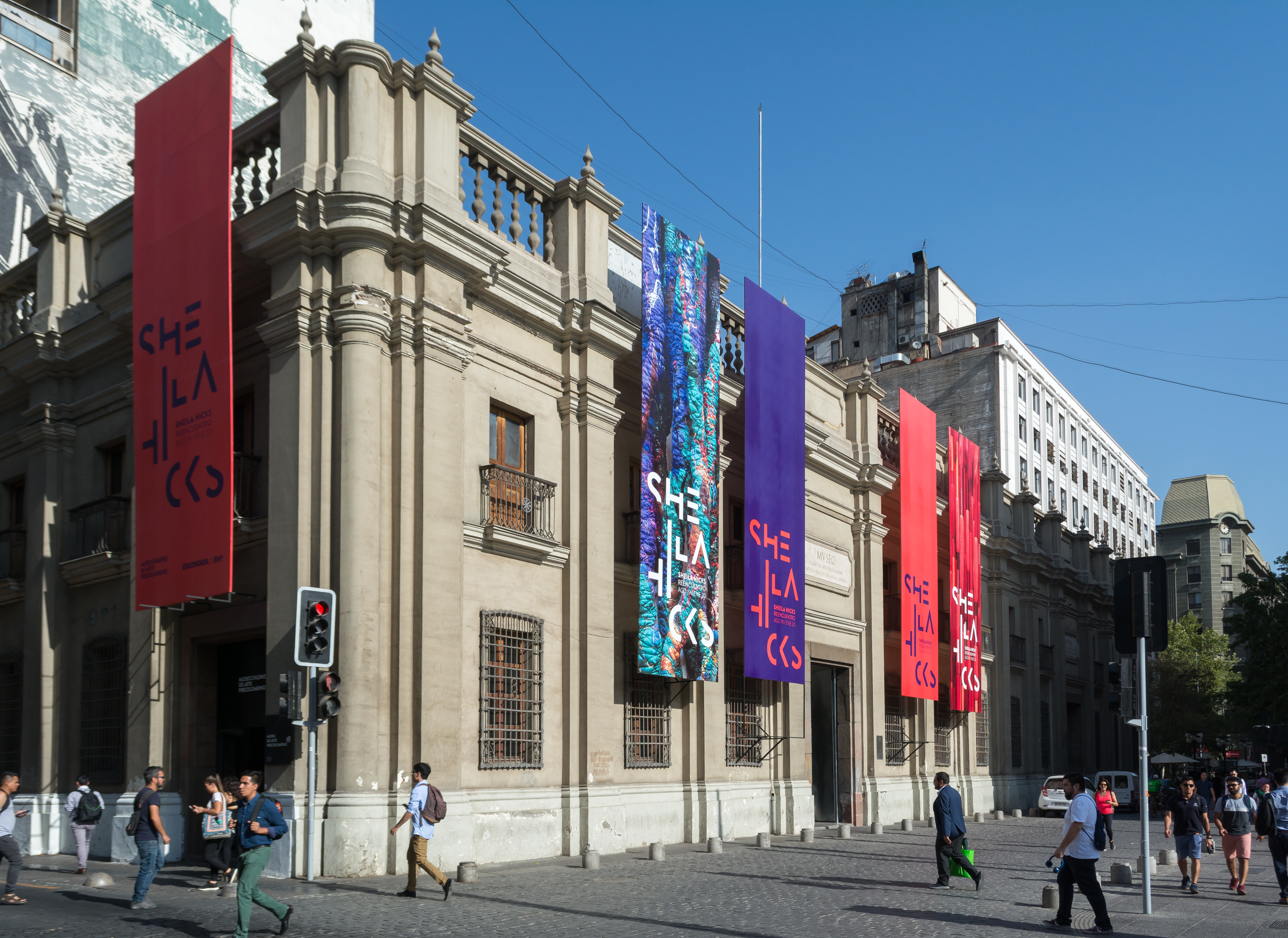 Museo Chileno de Arte Precolombino, Santiago, Región Metropolitana, Chile